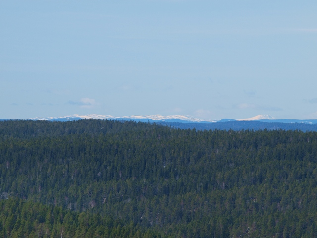 Blefjell og Gaustatoppen fra Elgheia